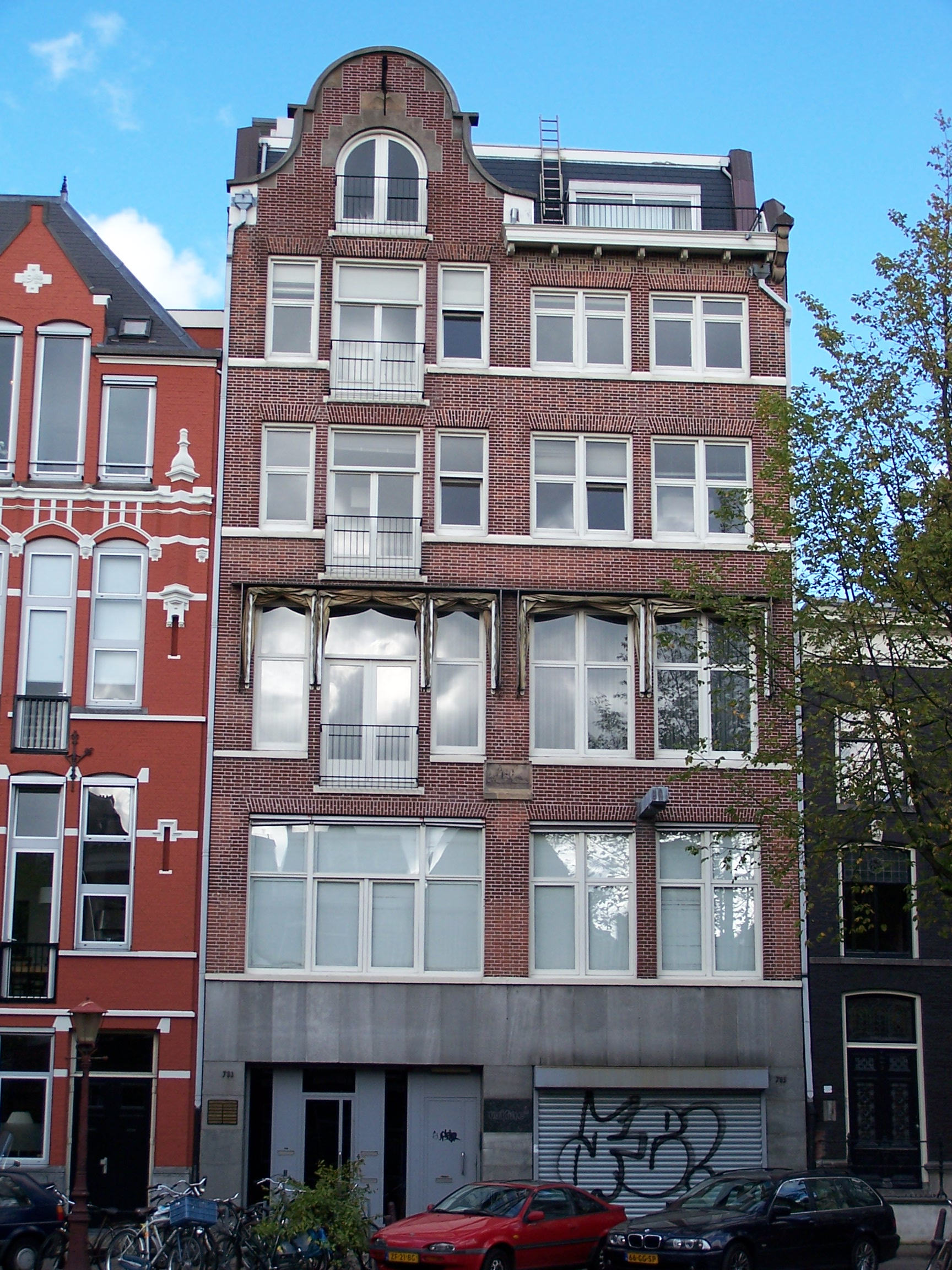 Prinsengracht 783 and 785